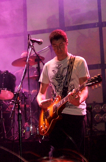 Santiago Tavella, cantente del Cuarteto de Nos